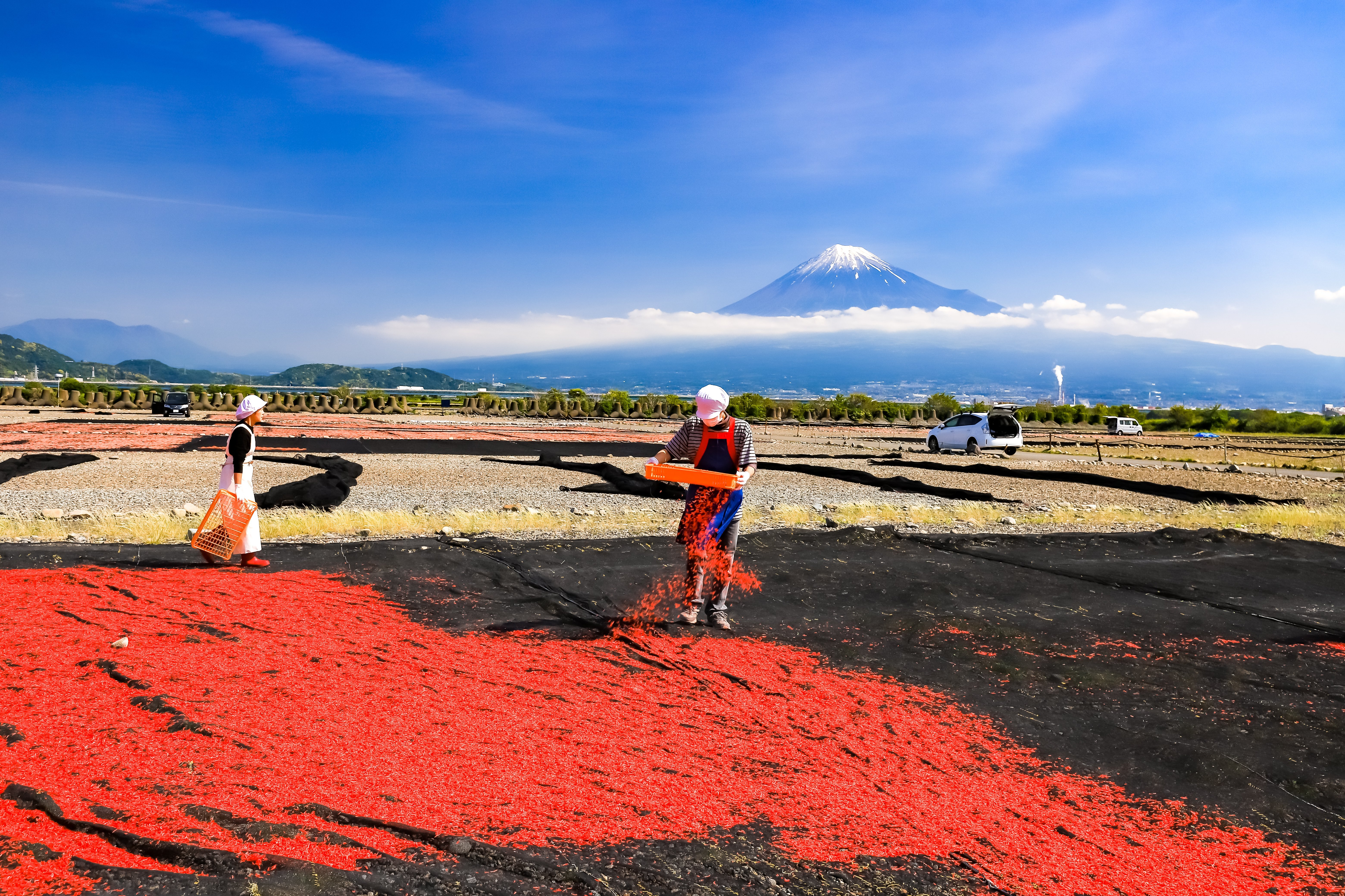 静岡県静岡市清水区、富士川、桜えび、桜えび干し場